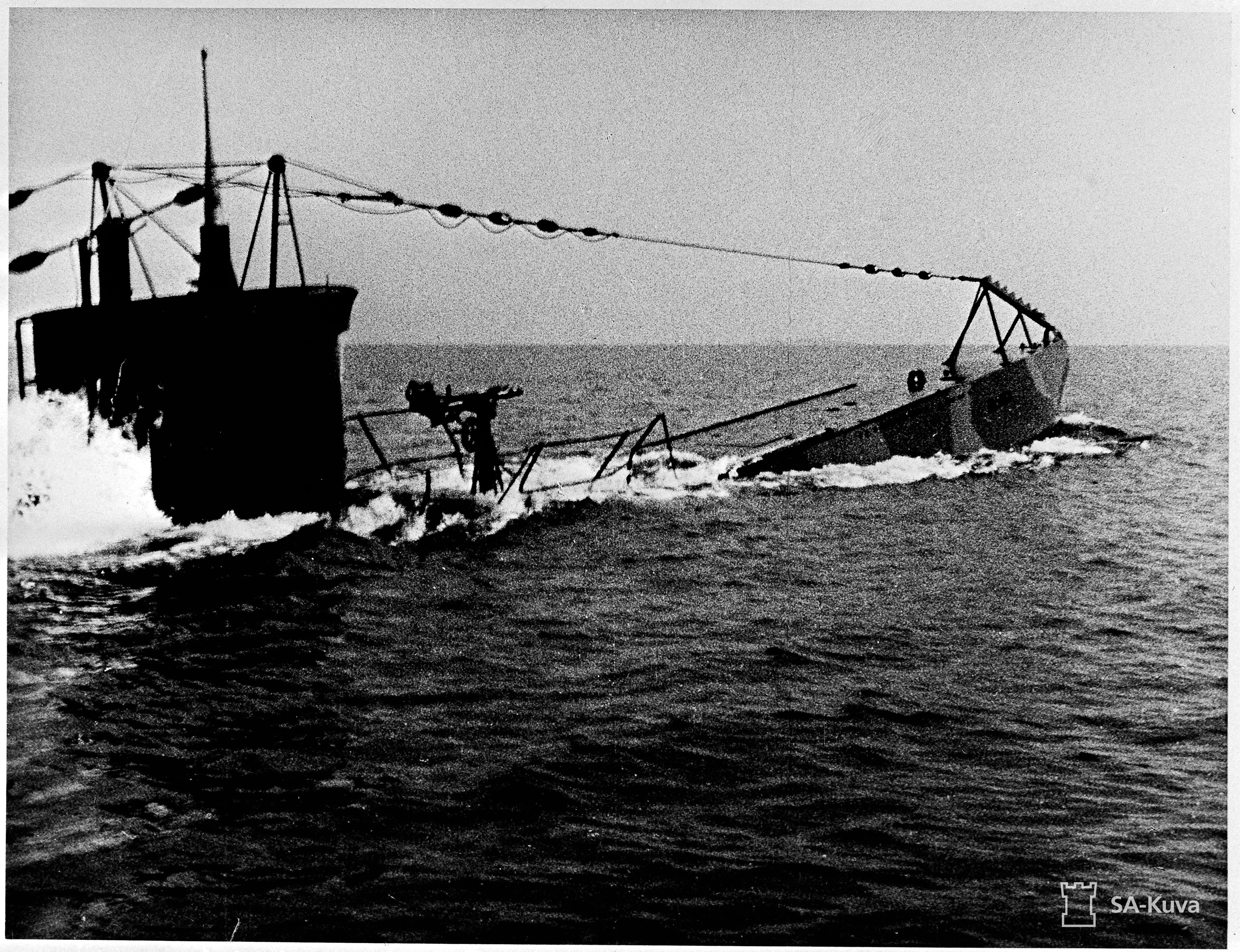 Sukellusvene ””Vesikko”” nousee ylös.; Sukellusvene ””Vesikko”” nousee ylös. Päivämäärä epäselvä.